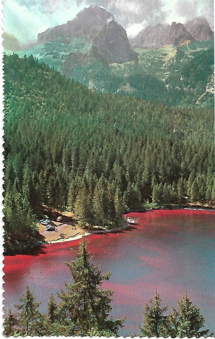 Lago di Tovel m. 1182 nel Gruppo di Brenta (Tuenno) - fenomeno di colorazione dell'unio lago rosso